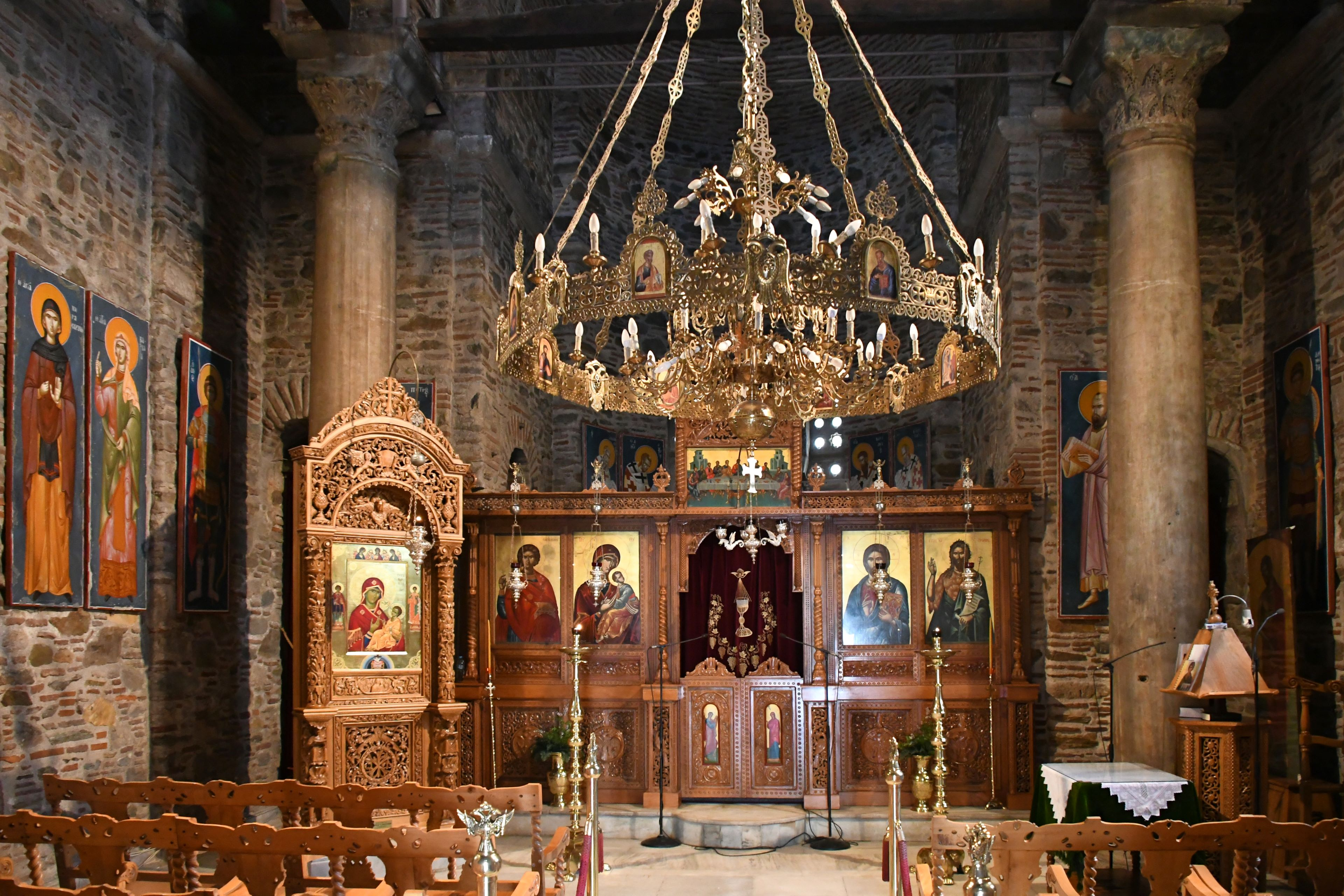 Thessaloniki, Kirche des Heiligen Panteleimon Ναός του Αγίου Παντελεήμονα (14. Jhdt.)